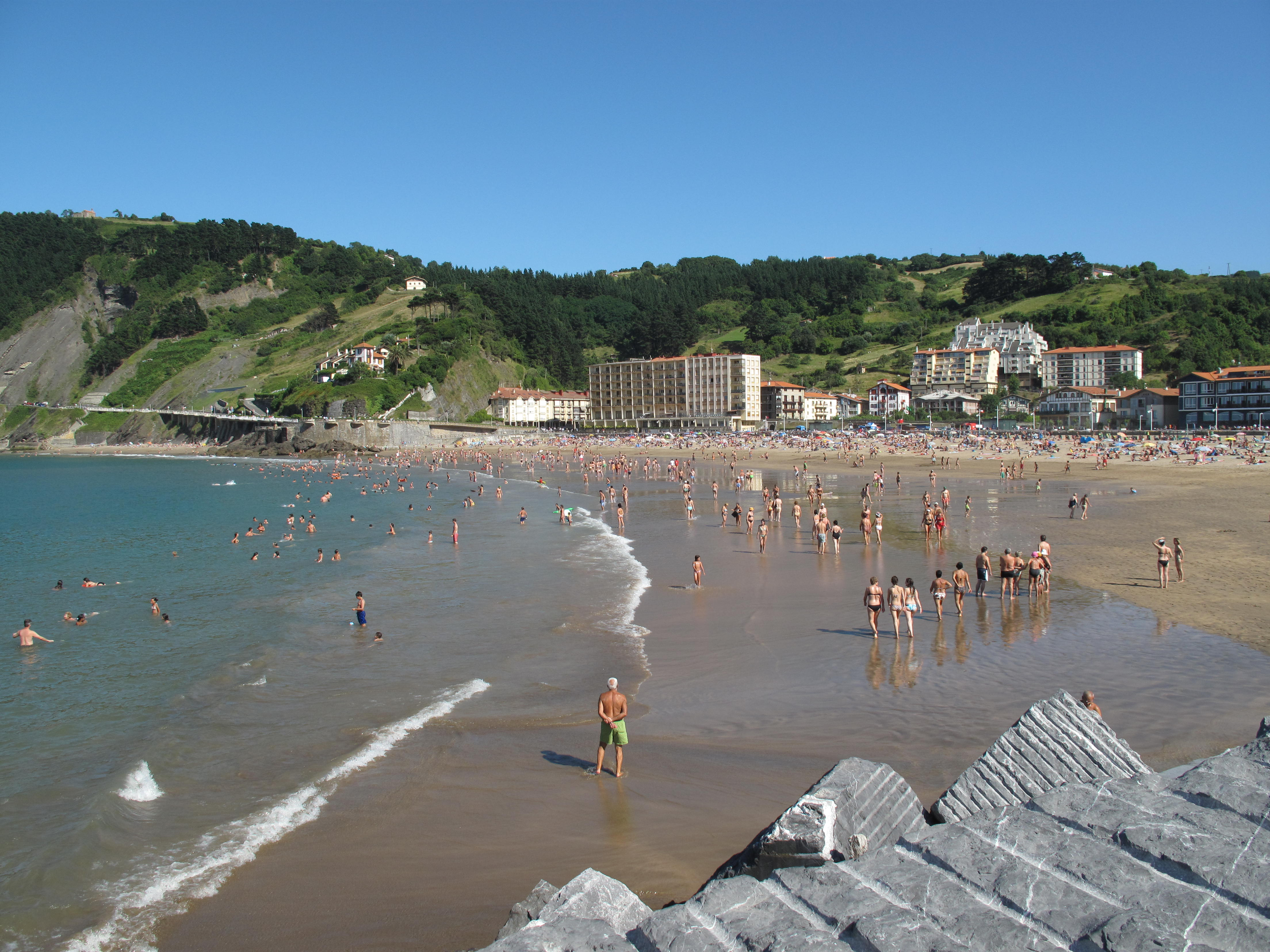 Playa de Deba (Guipuzcoa).